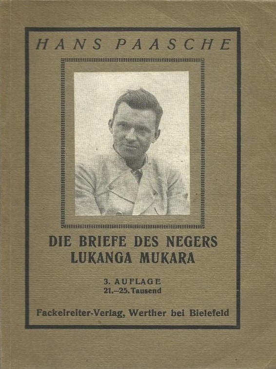 Hans Paasche (1881-1920): Die Forschungsreise des Afrikaners Lukanga Mukara ins innerste Deutschland. Geschildert in Briefen Lukanga Mukaras an den König Ruoma von Kitara. Werther bei Bielefeld, Fackelreiter-Verlag o.J, 3. Aufl. (21.-25. Tsd.)